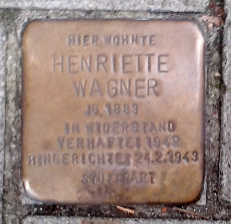 Stolperstein in Mannheim, Heinrich-Lanz-Str. 28